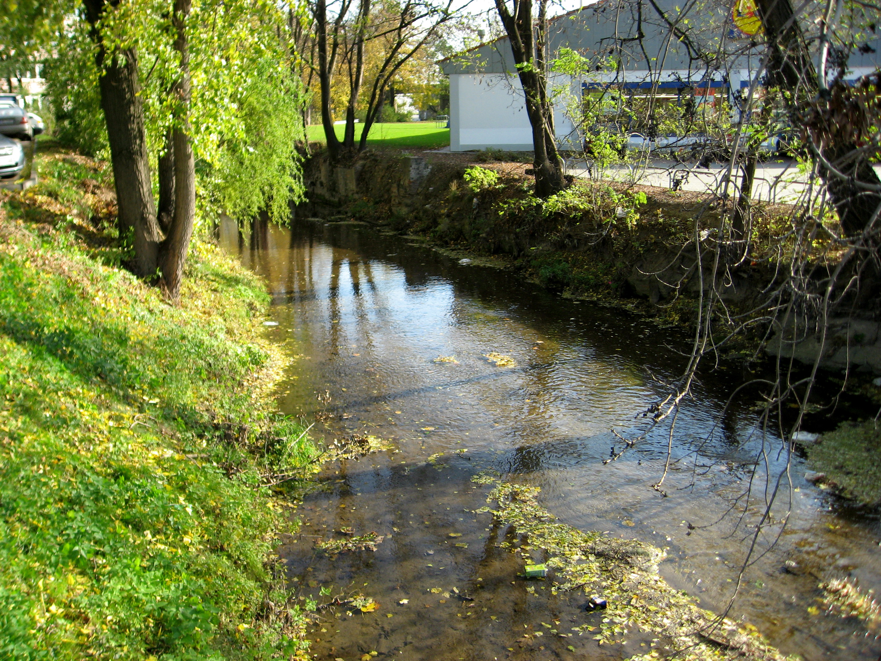 Svitavský náhon u Lidlu